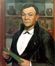 Portrait de Zacharie le Rouzic, conservateur, préhistorien, protecteur des mégalithes bretons (Carnac)